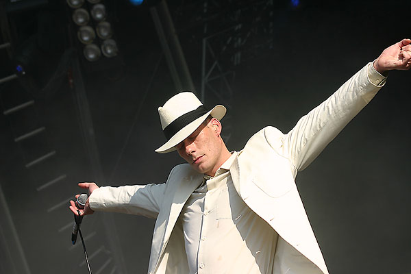 Eskil Simonsson, Sänger von Covenant. Konzertfoto vom Mera Luna 2007.